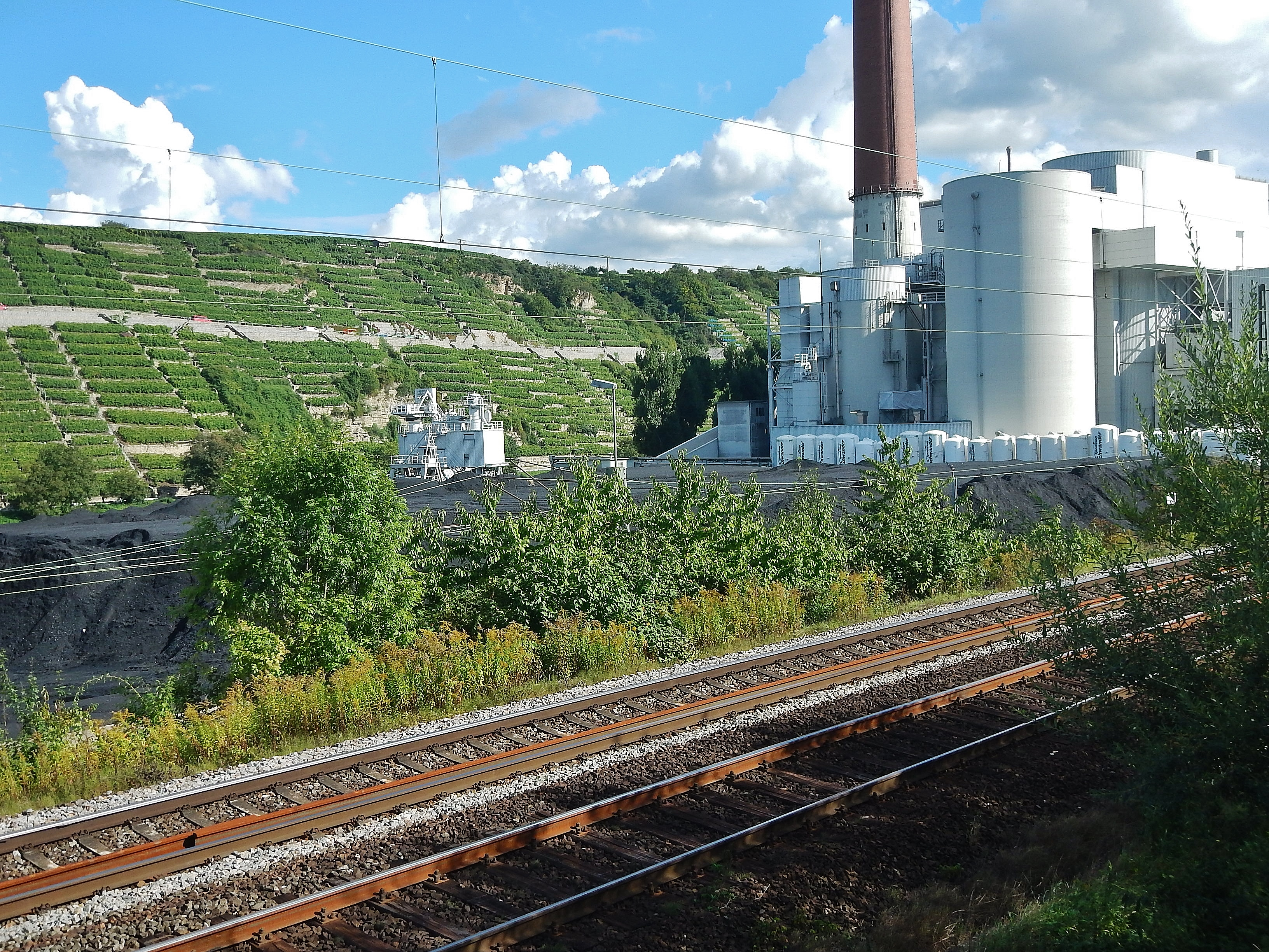 Beim 366 km langen Neckartalradweg: Weinberge, Eisenbahn und EnBW Kraftwerke bei Walheim